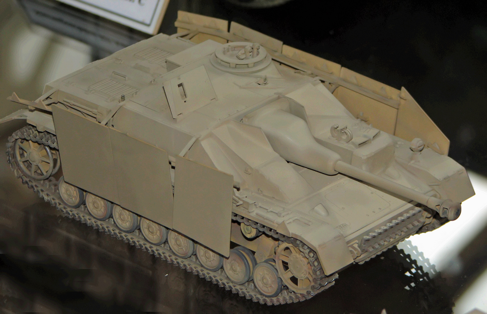 Dieses Bild zeigt ein Modell vom Stug IV.